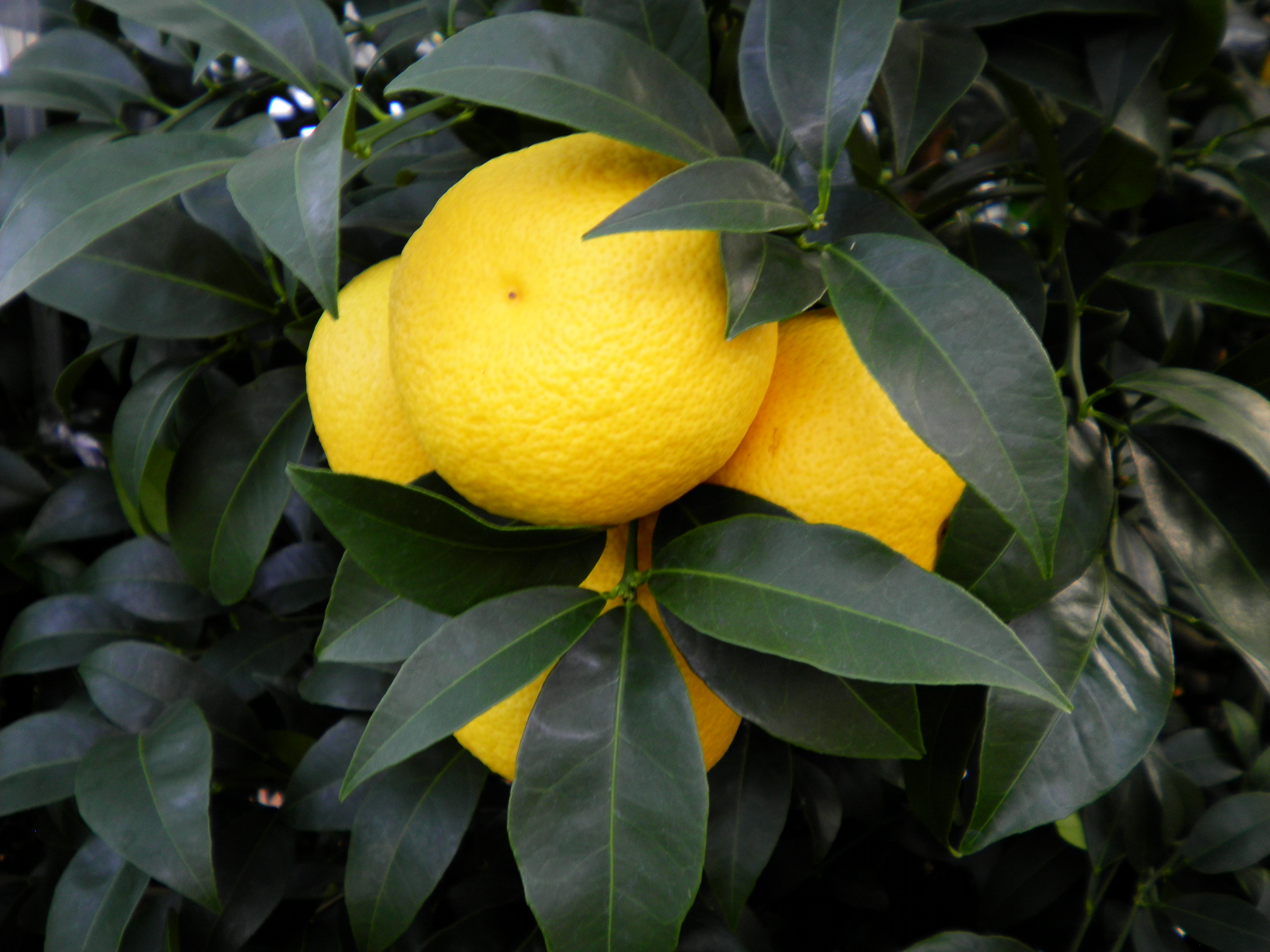 湘南ゴールド:Shonan gold(Japan)